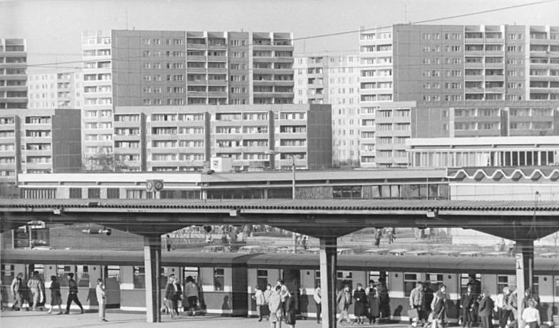 ADN-ZB-Zimmermann-28.4.87/Berlin: Viele Marzahner erreichen über den S-Bahnhof Springpfuhl das Neubaugebiet. Die S-Bahn ist das bedeutendste Nahverkehrsmittel in Berlin. Auf ihrem 172 Kilometer langen Streckennetz mit 78 Bahnhöfen werden täglich rund 700 000 Fahrgäste befördert. Information added by Wikimedia users.picture shows the view across Spingpfuhl Park. The buildings in the back ( type WBS 70/5 and WBS 70/11 ) stand along Murtzaner Ring. The buldings in the very back belong to the Plattenbau type WBS/QP 71-R along Langhoffstraße